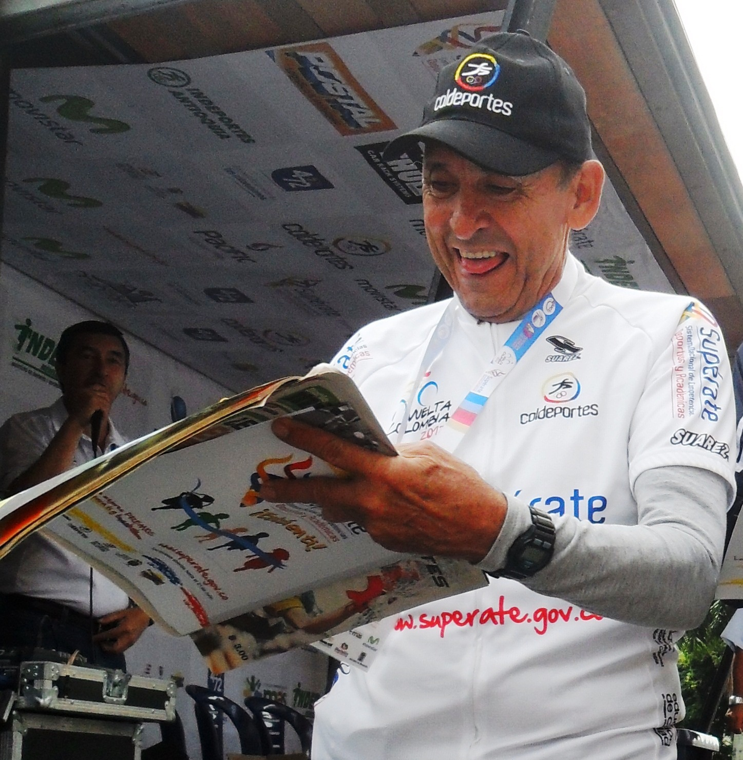 martin emilio cochice rodriguez firmando autografos en la vuelta acolombia 2012